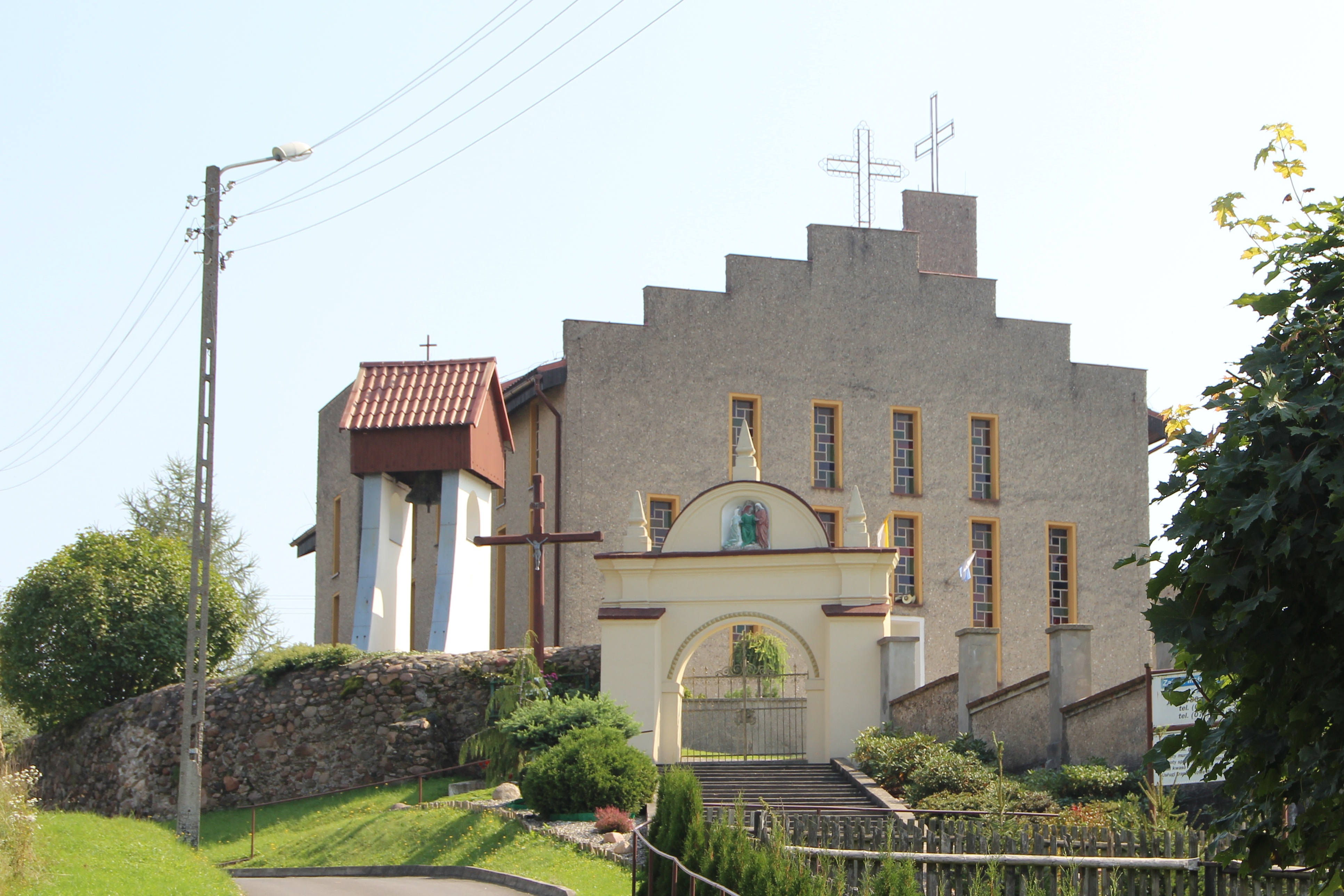 Jaszów – rzymskokatolicki kościół filialny pw. św. Anny, 1977-1980.